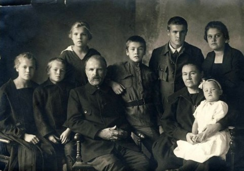 Луппов Павел Николаевич (1867-1949), Луппова (урожд. Каринская) Нина Михайловна (1878-1957) и их дети, Вятка, нач. 1920-х г.г.